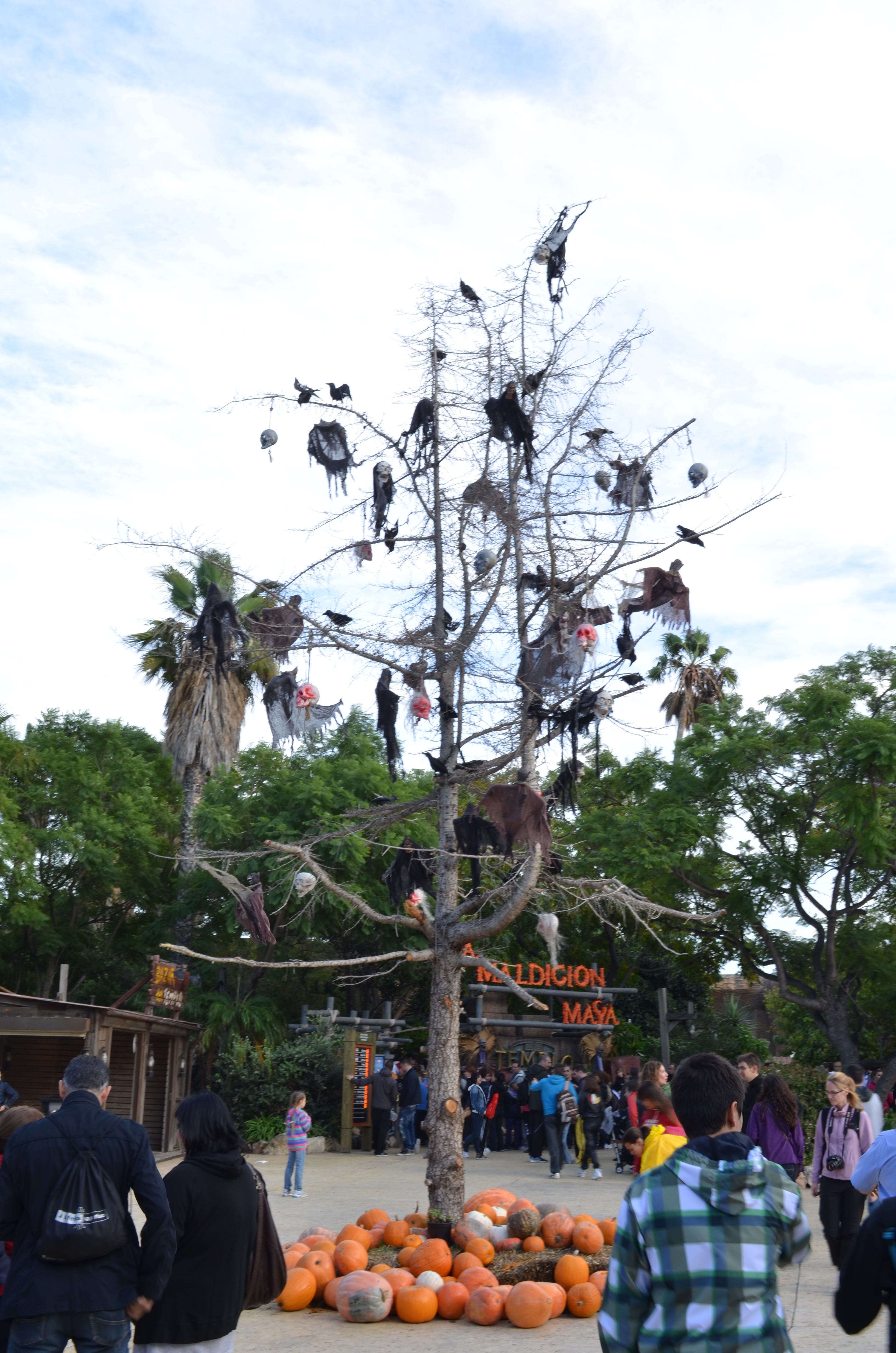 Plaza central de Mexico